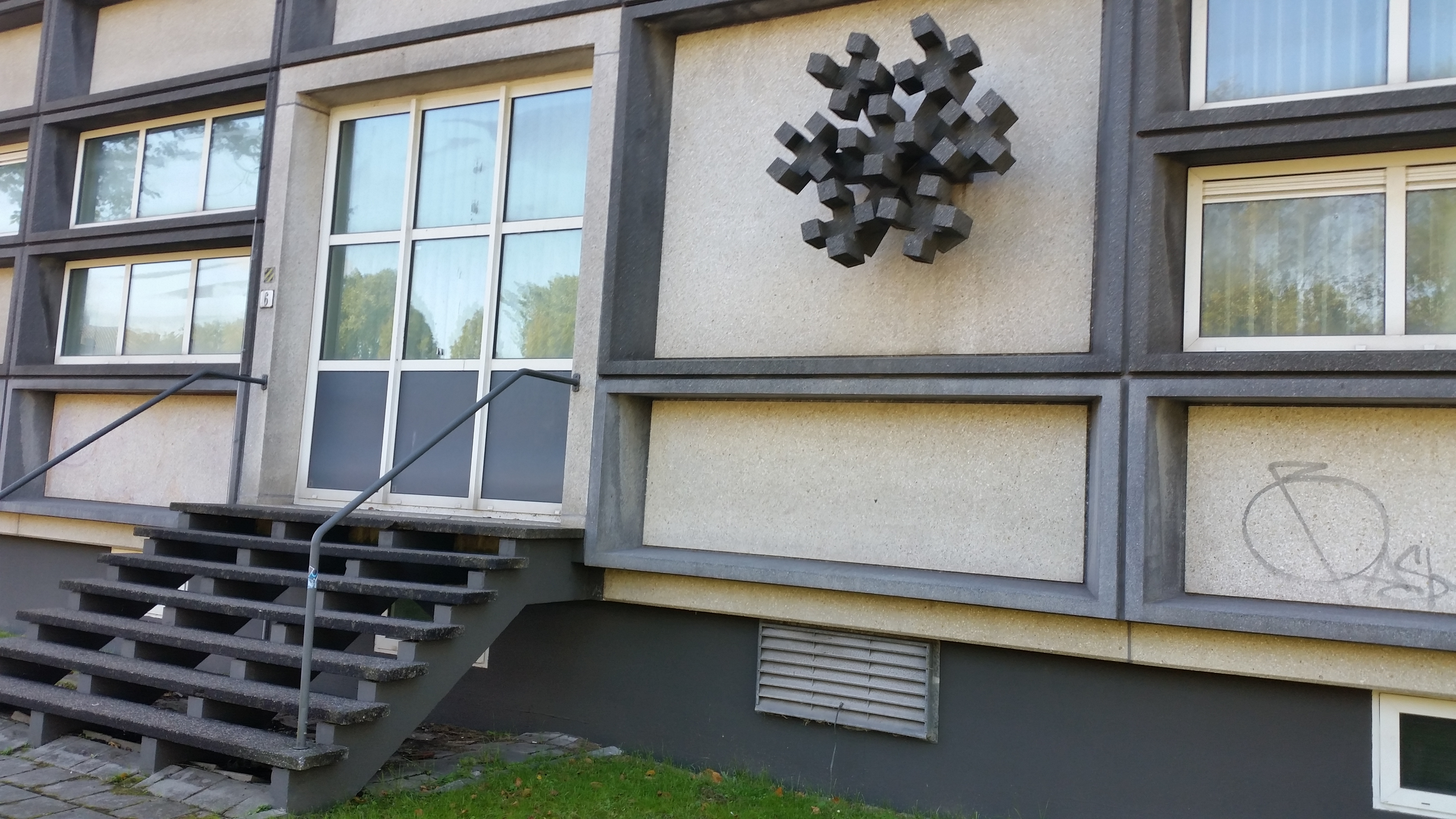 Straalcompositie, van Henk Zweerus